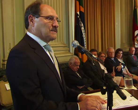 José Ivo Sartori discursando na posse como governador do Rio Grande do Sul.